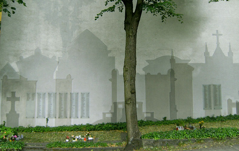 Urnenhain Geminschaftsgrabstelle Alter St.-Matthäus-Kirchhof. Fassadengestaltung Projekt von EFEU e.V. Foto Ludger Wekenborg (StMatthaeus)